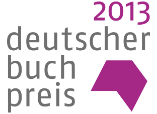 Logo Deutscher Buchpreis 2013